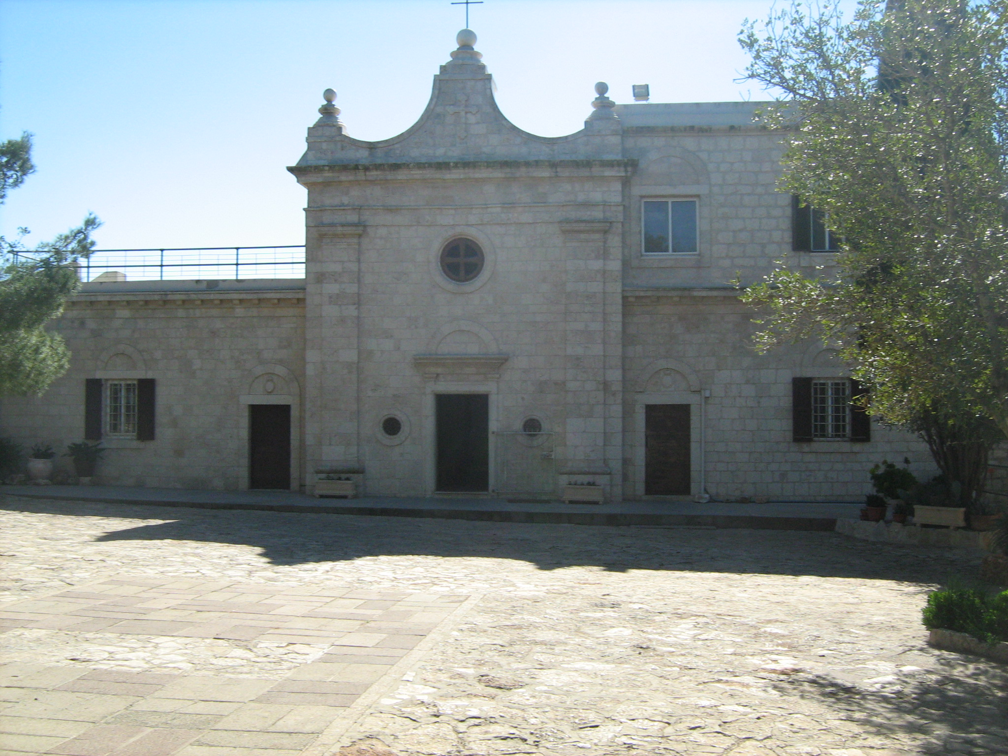 הכנסייה בקרן הכרמל